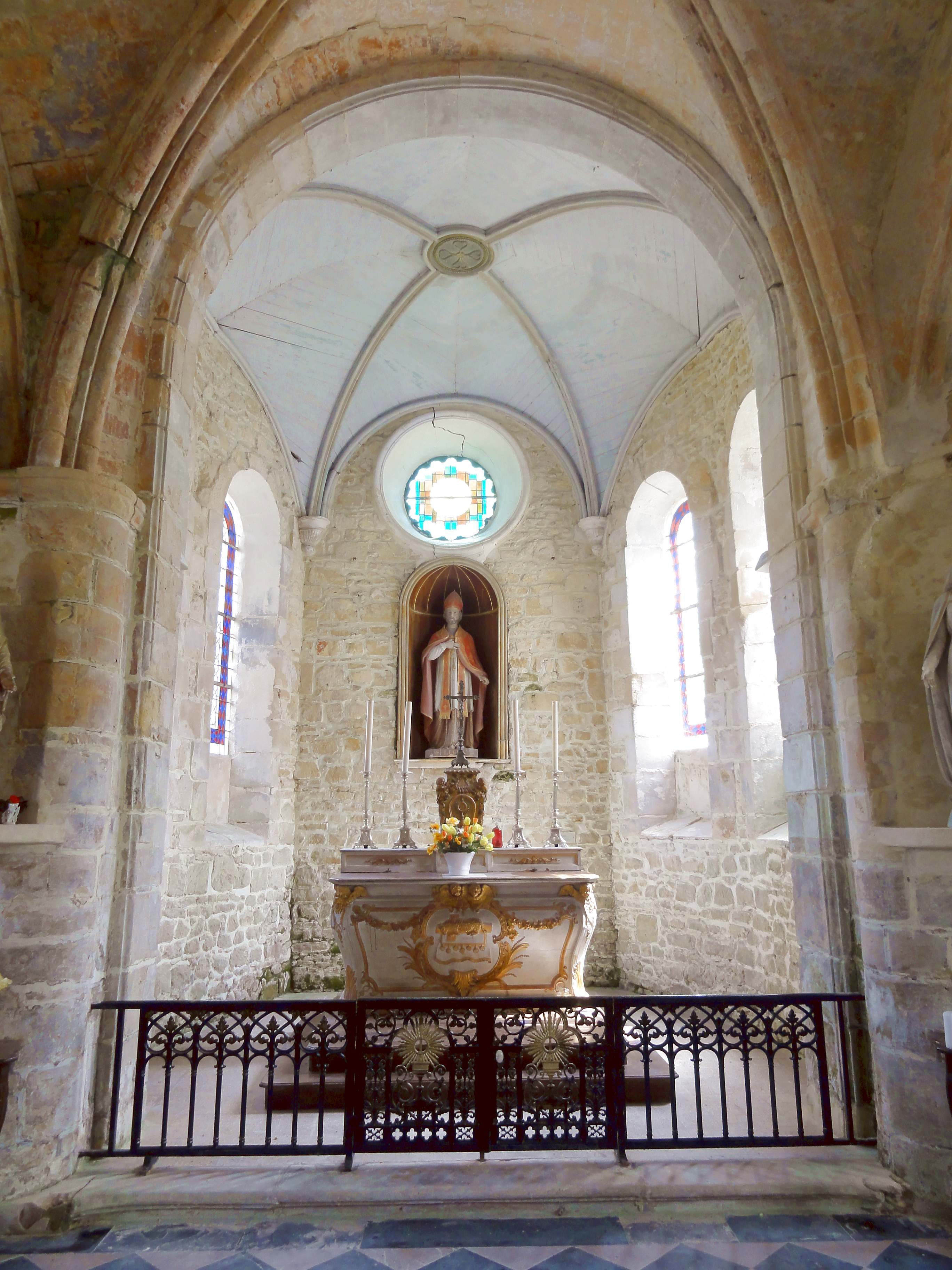 Intérieur de l'église - voir titre.